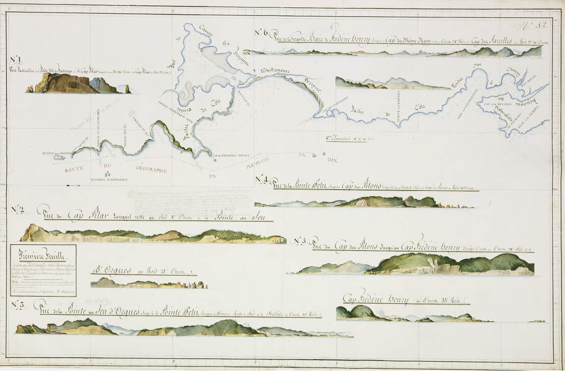 Expédition Baudin sur "Le Géographe". Carte de la côte orientale de l'isle de Diemen [baie de Frederick Henry, au sud de la Tasmanie]